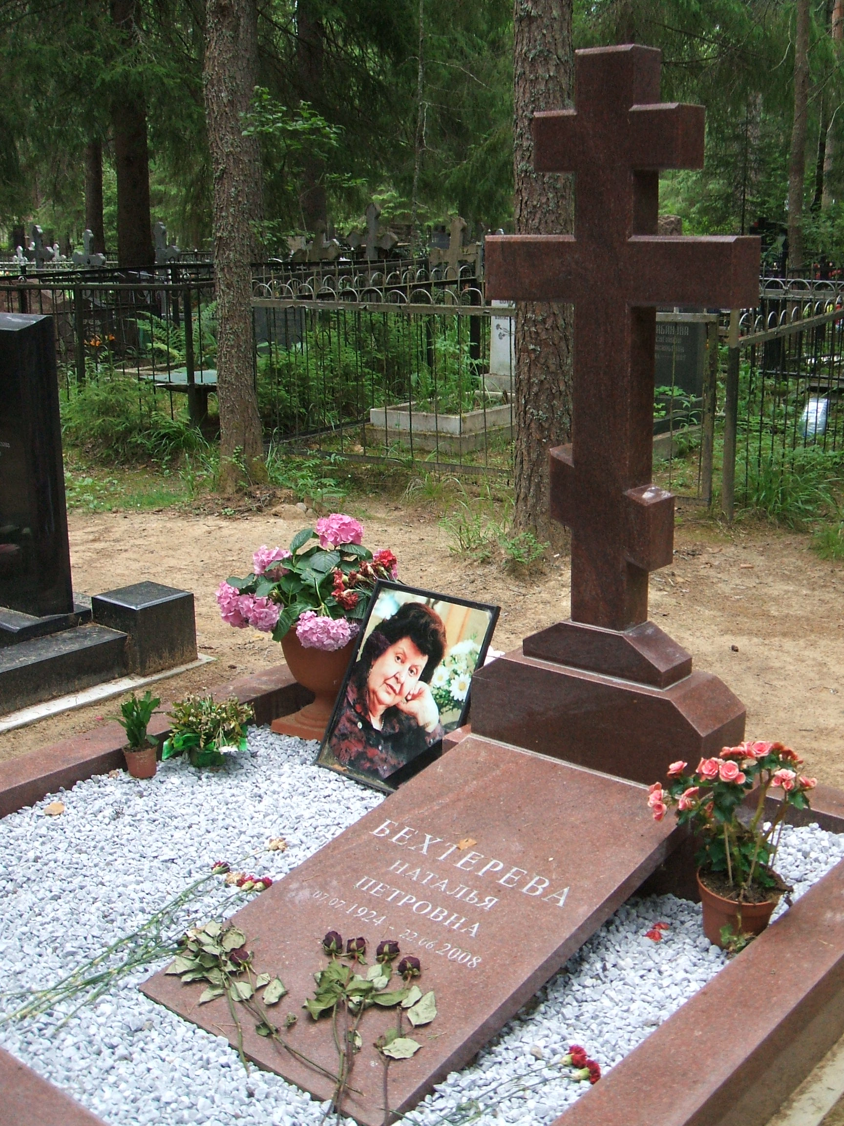 Комаровский некрополь под СПб. Могила Бехтеревой